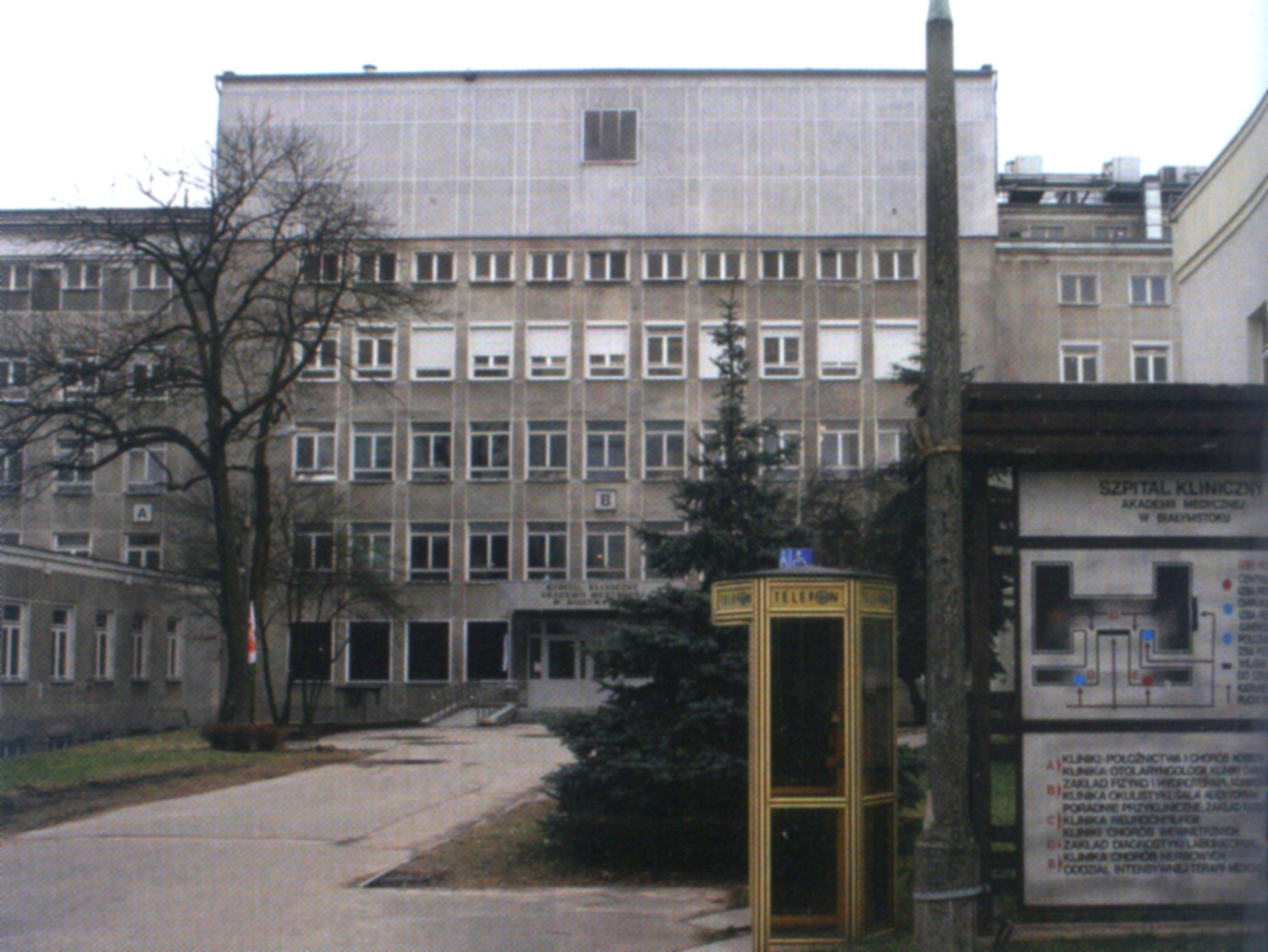 Samodzielny Publiczny Szpital Kliniczny UMB